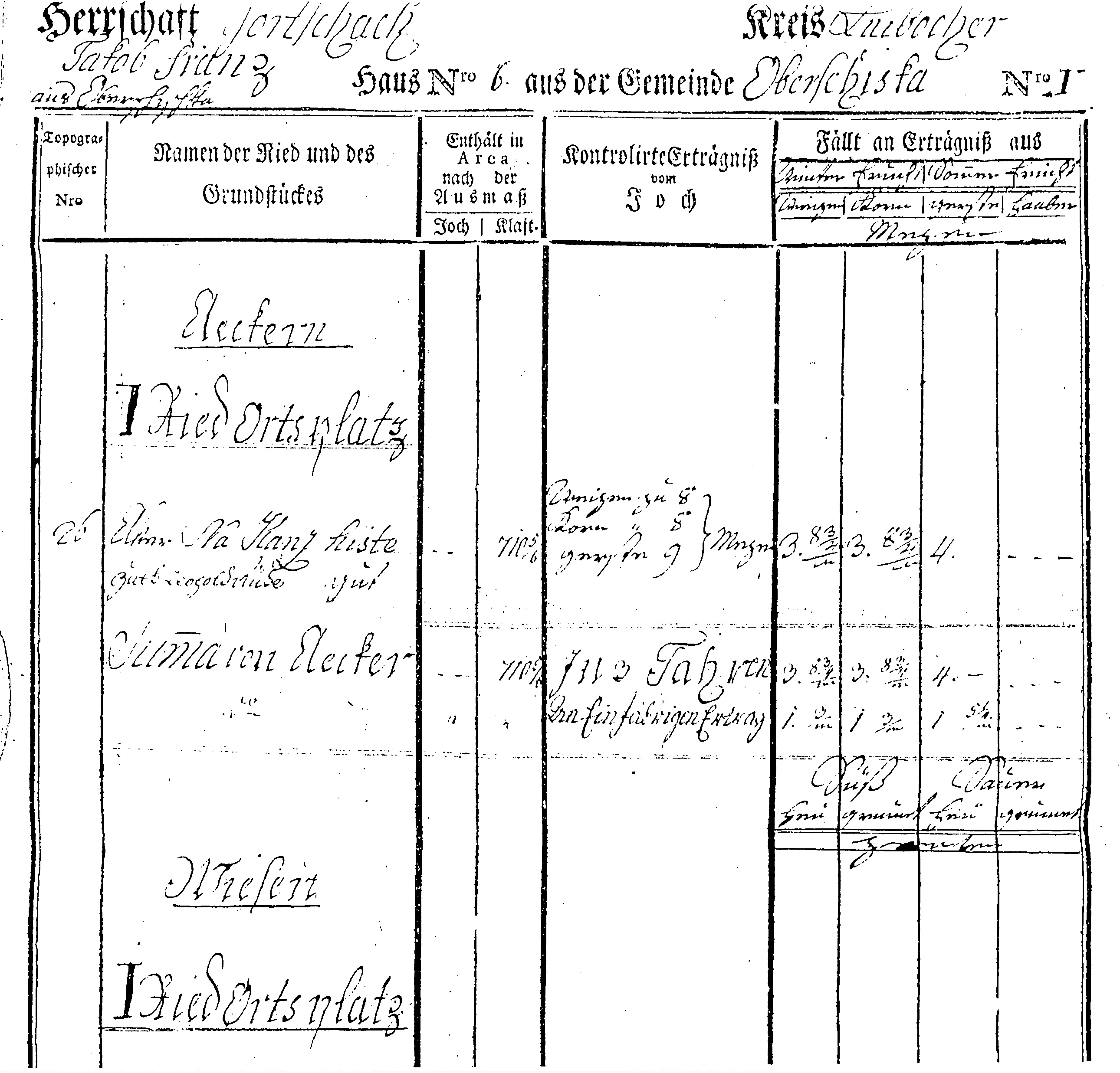 Jožefinski kataster za Kranjsko, naborni okraj Goričane, davčna občina Zgornja Šiška, posestni list Jakoba Franca.